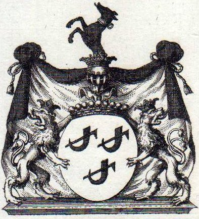 Reichsgräfliches Wappen der Viereggs